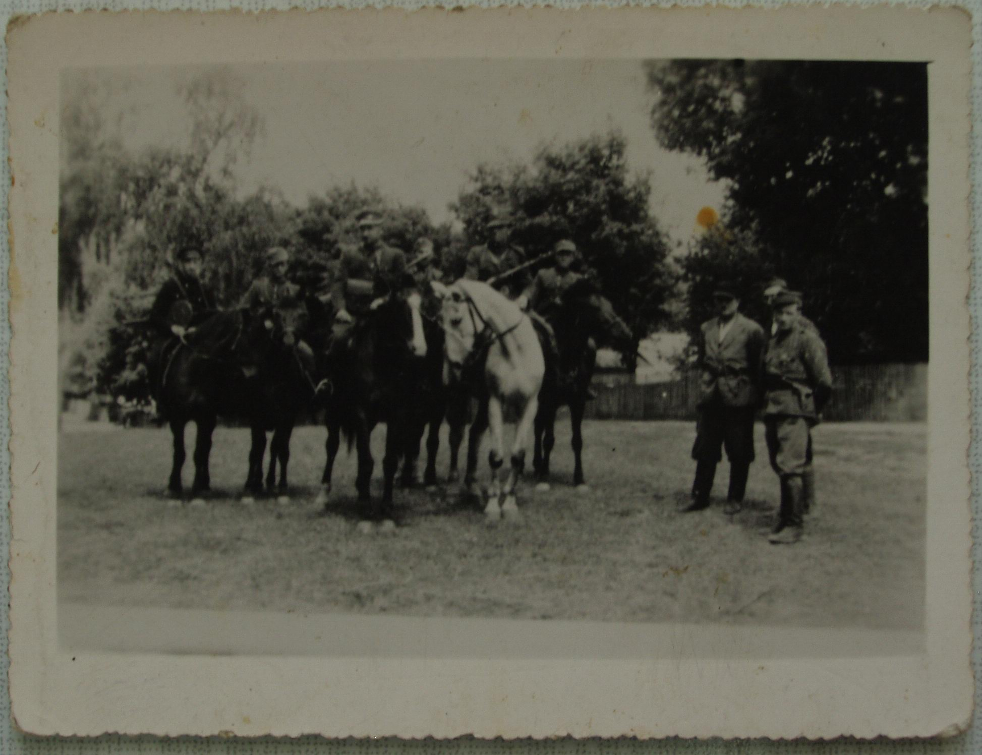 Partyzanci